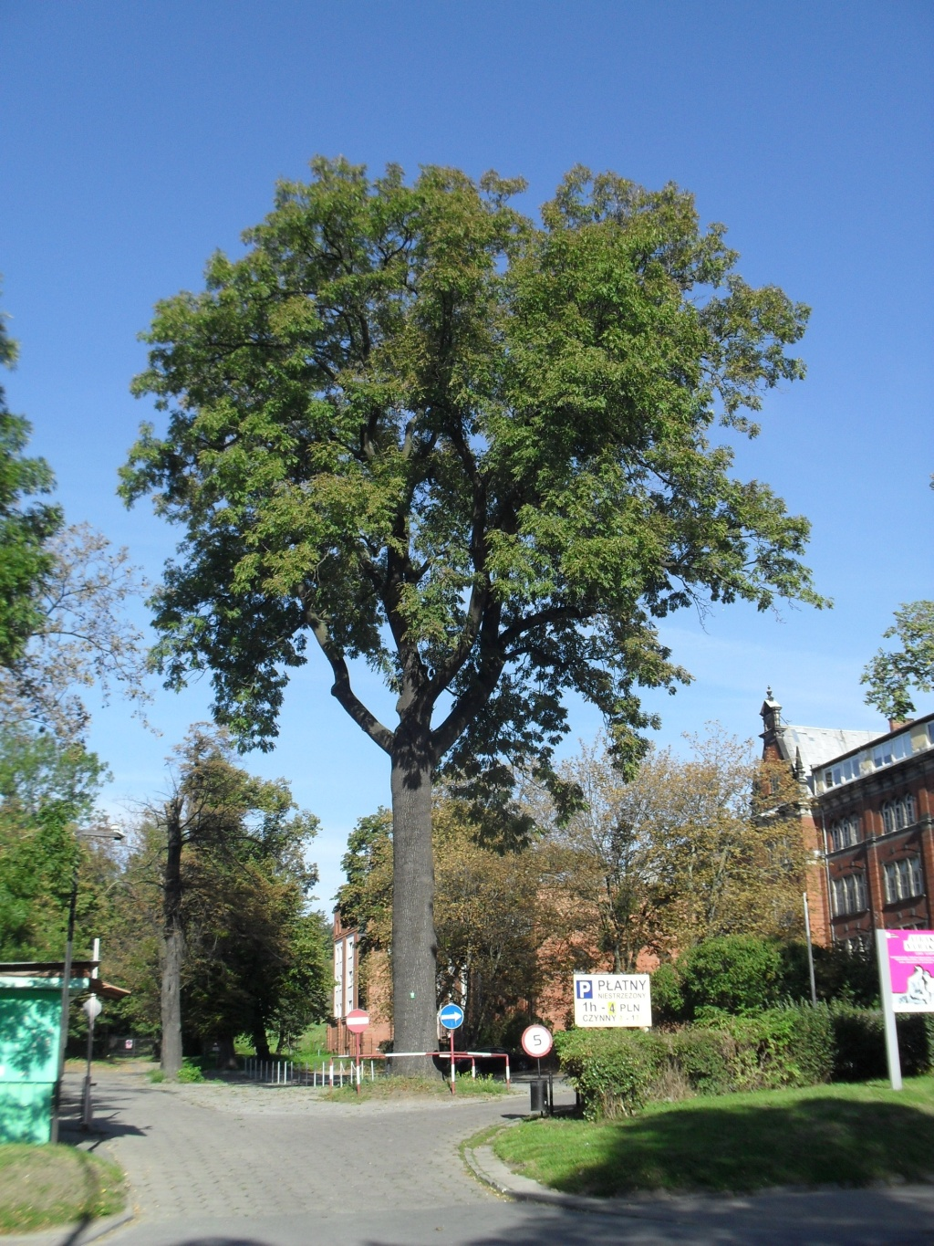 1049 Jesion wyniosły - pomnik przyrody - na parkingu Powiatowego Urzędu Pracy w Gdańsku. Obwód w 2014 roku wynosił 373 cm.